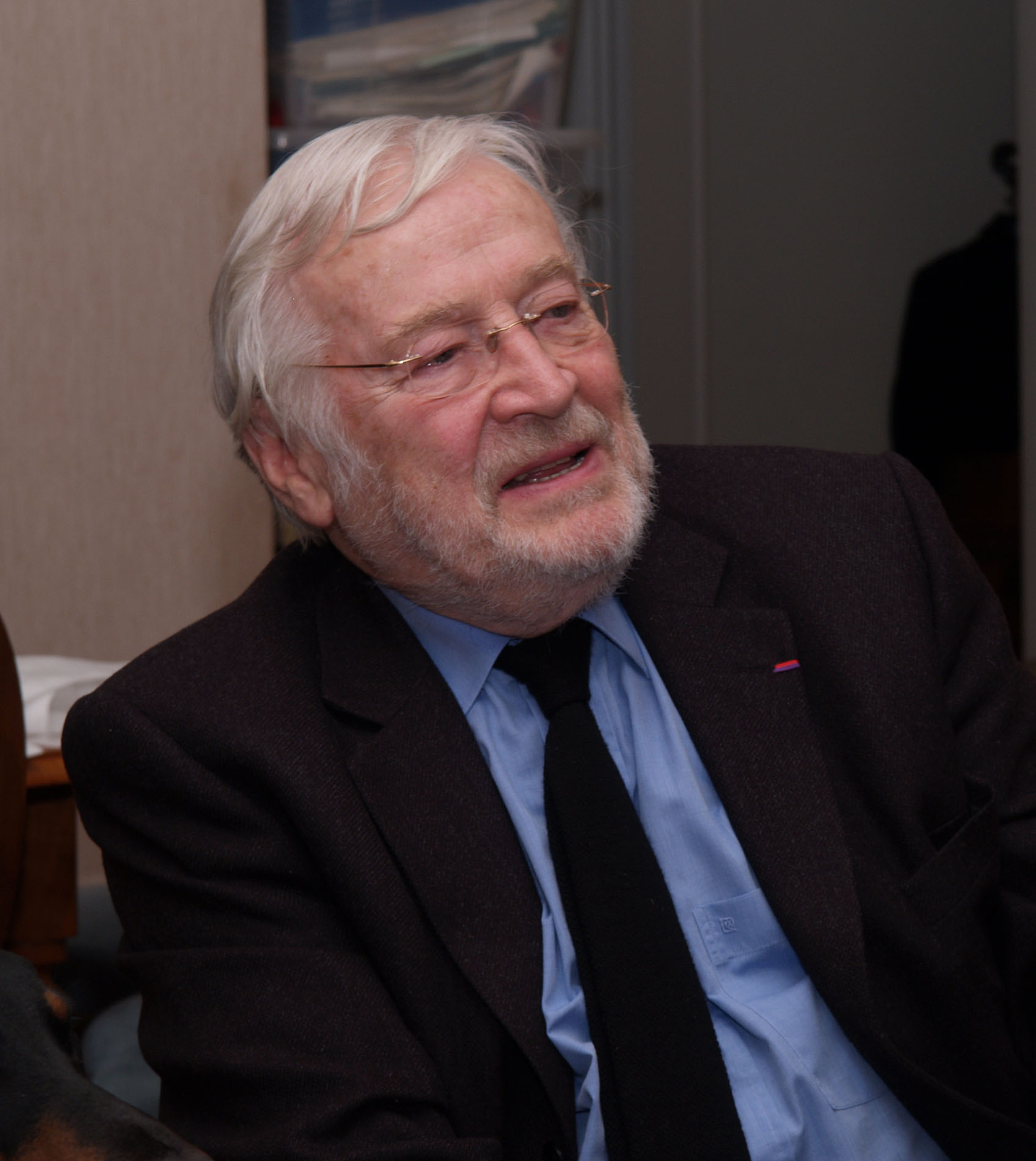 portrait